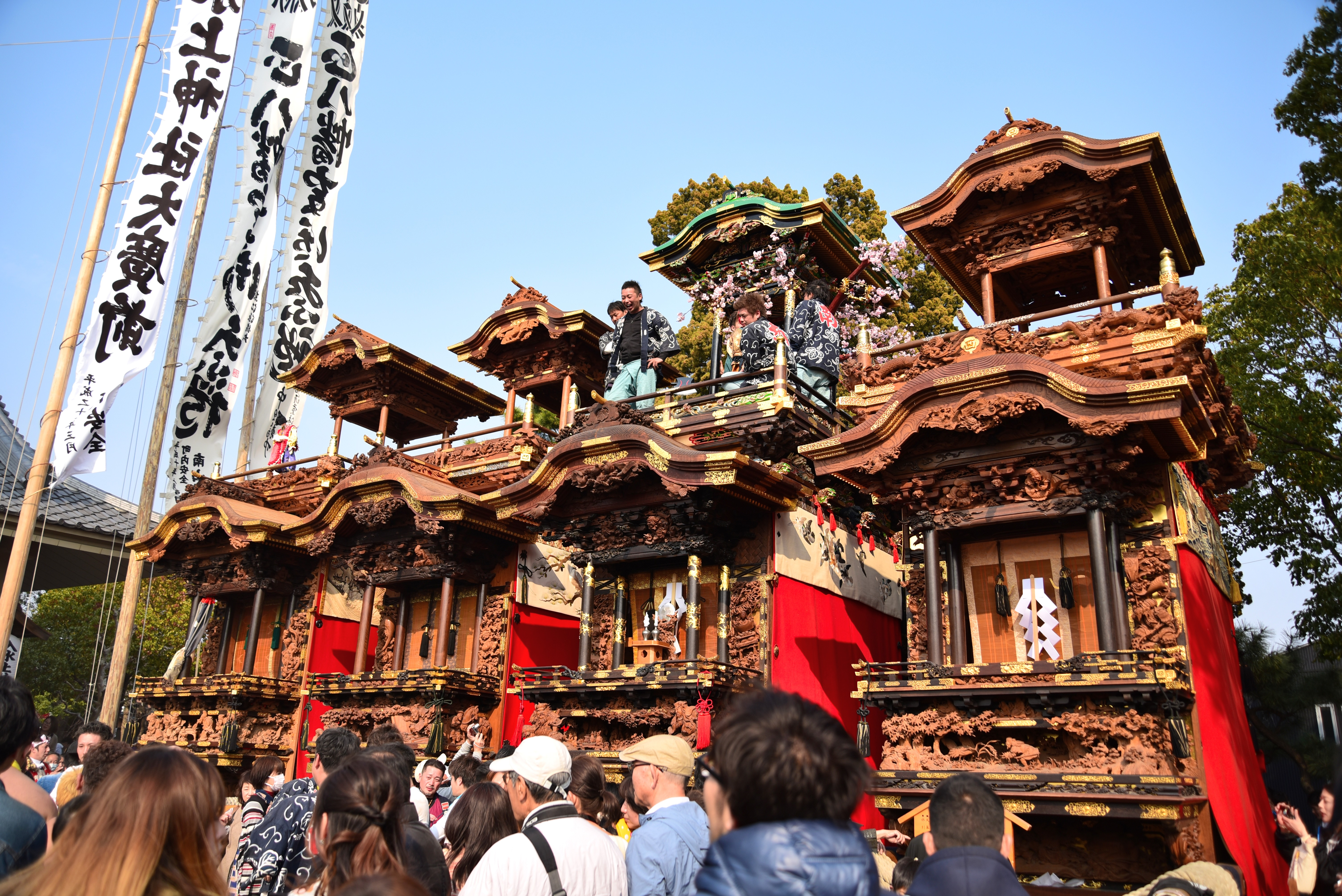 愛知県半田市の乙川祭禮。山車の数は4台